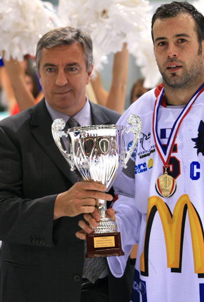 Trophée Lacarriére remis par Luc Tardif, président de la FFHG, à Baptiste Amar, capitaine des Brûleurs de loups de Grenoble.